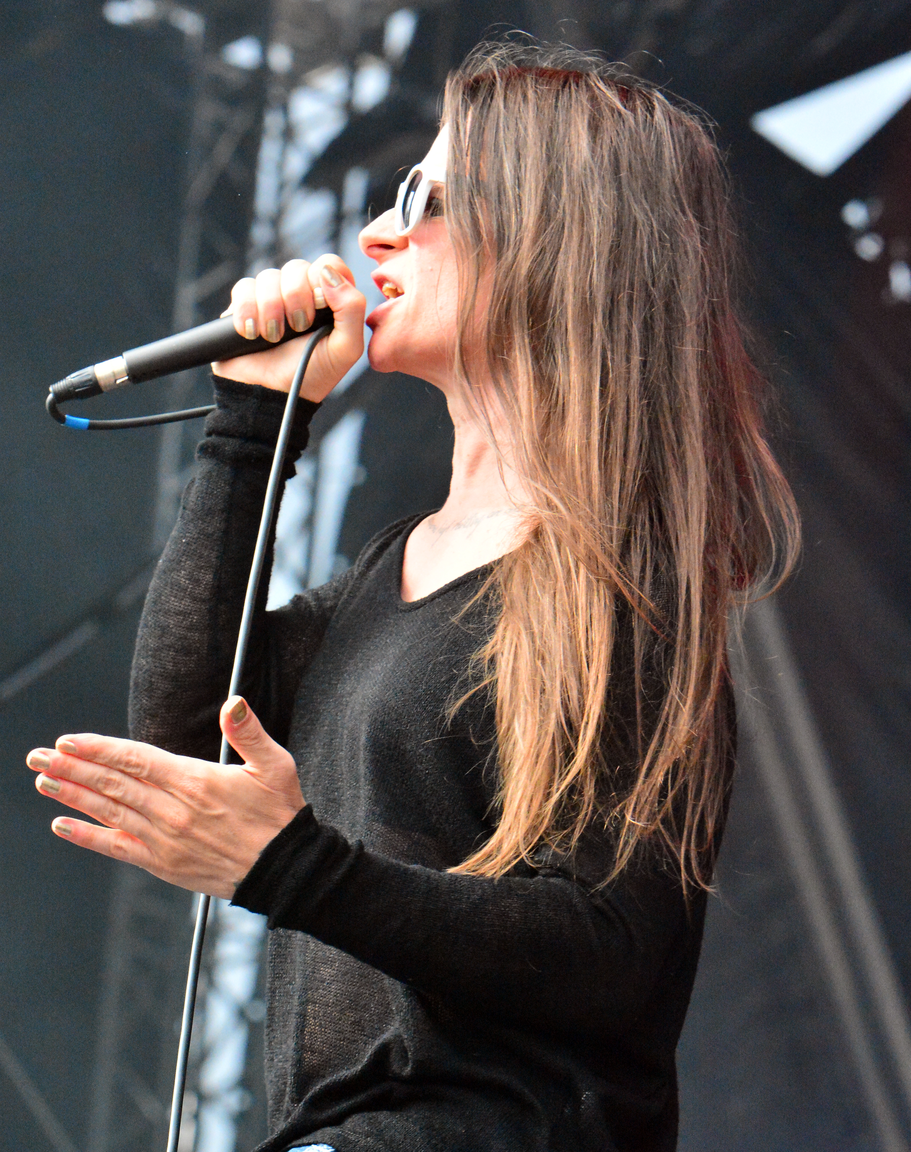 Mina Caputo früher auch Keith Caputo von Life of Agony beim Elbriot 2014